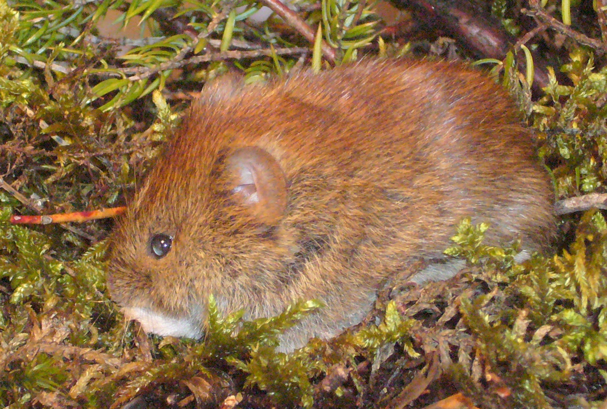 Myodes glareolus